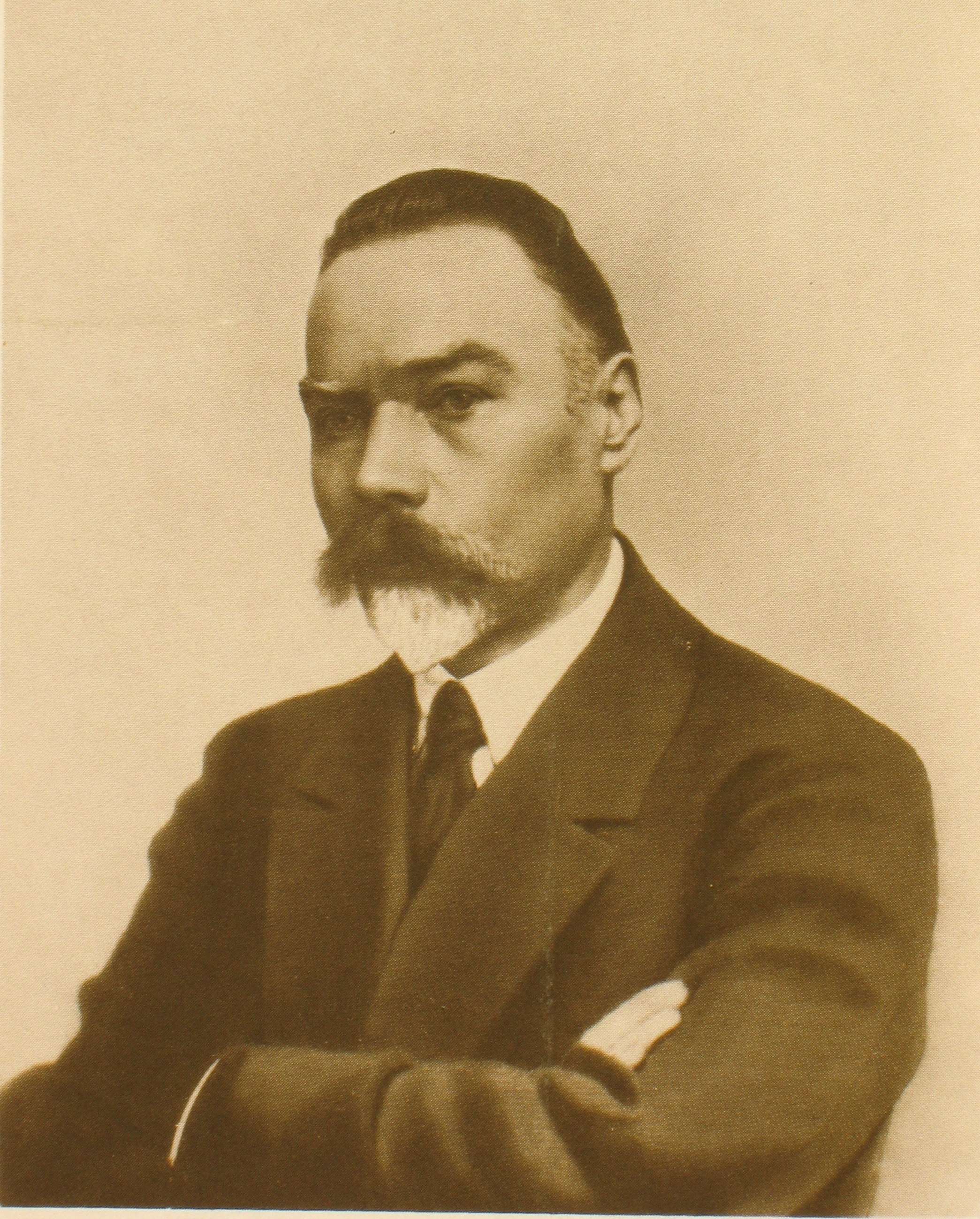 Russian poet Valeriy Bryusov.